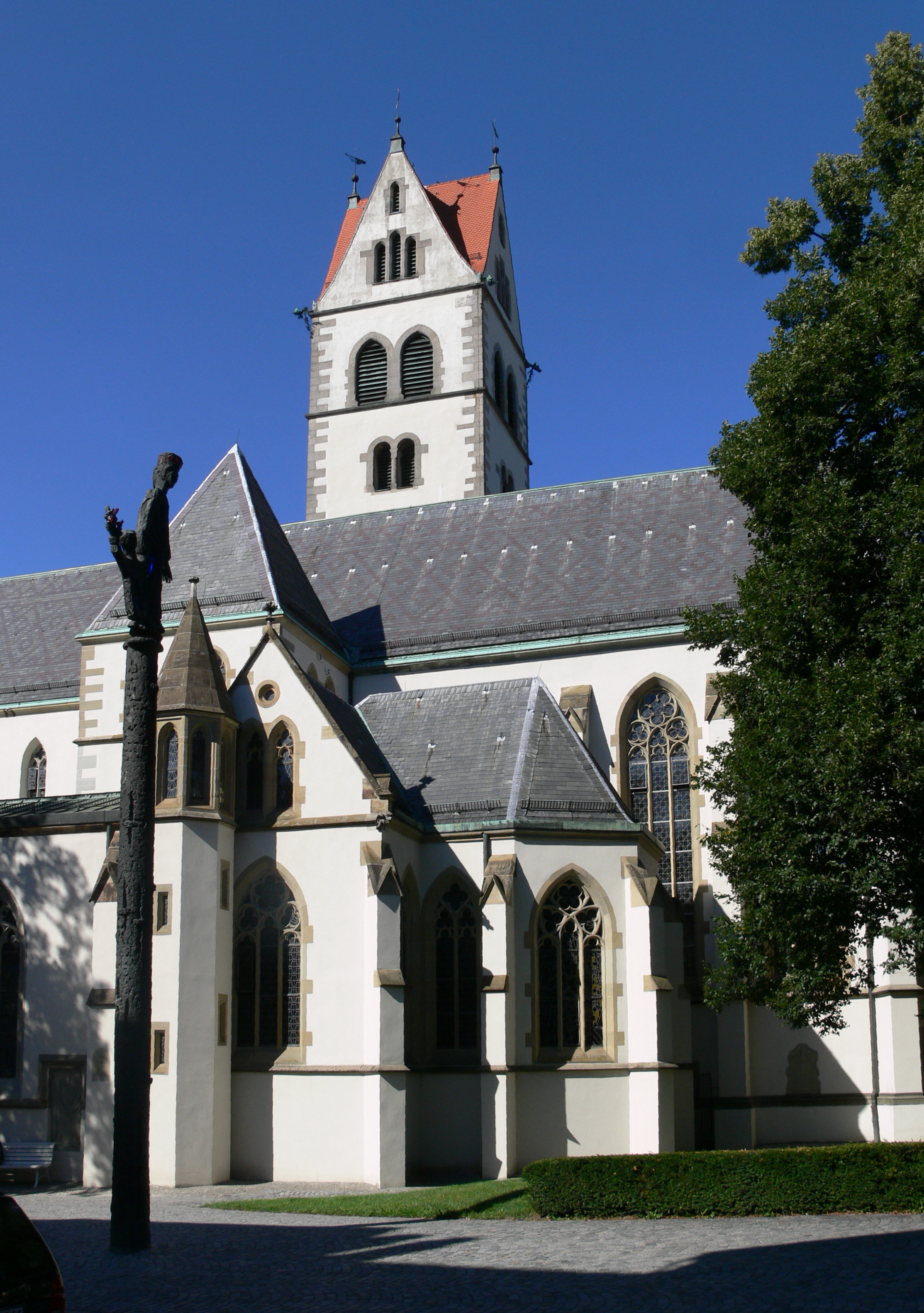 Liebfrauenkirche (Pfarrkirche Unserer Lieben Frau), Ravensburg Ansicht von der Herrenstraße, links Mariensäule von Maria Elisabeth Stapp